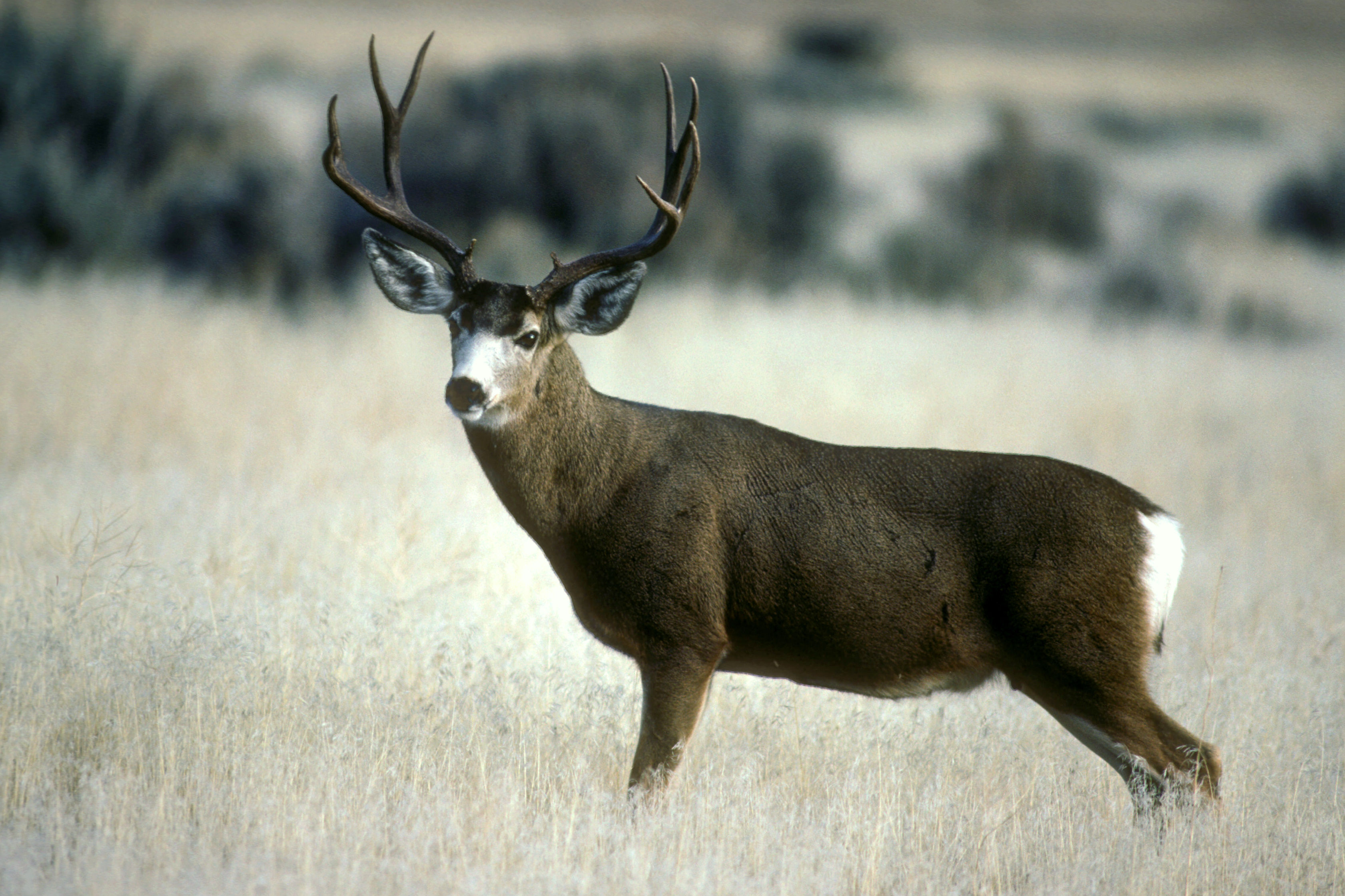 Mule Deer at Lava Beds Monument